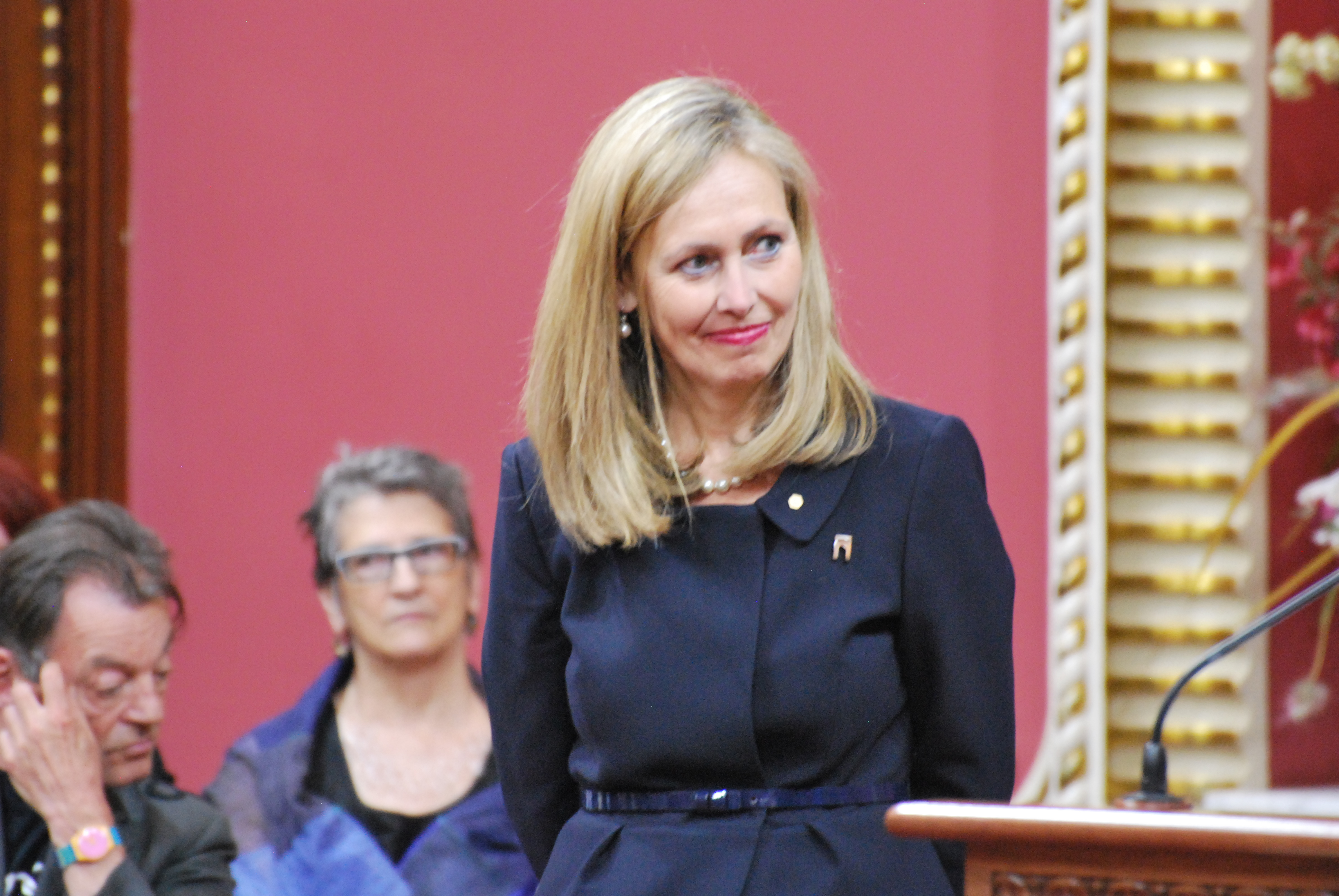 Monique F. Leroux lors de la cérémonie de remise de l'ordre national du Québec 2013.